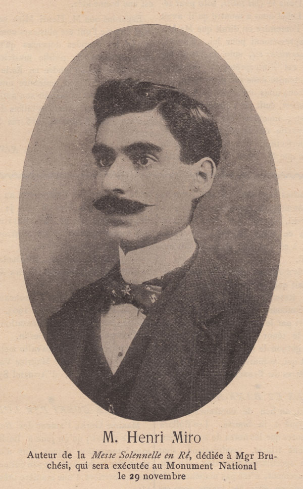 Publicité annonçant la « Messe solennelle en ré » d'Henri Miro; parue dans la revue Le Passe-Temps du 21 novembre 1903